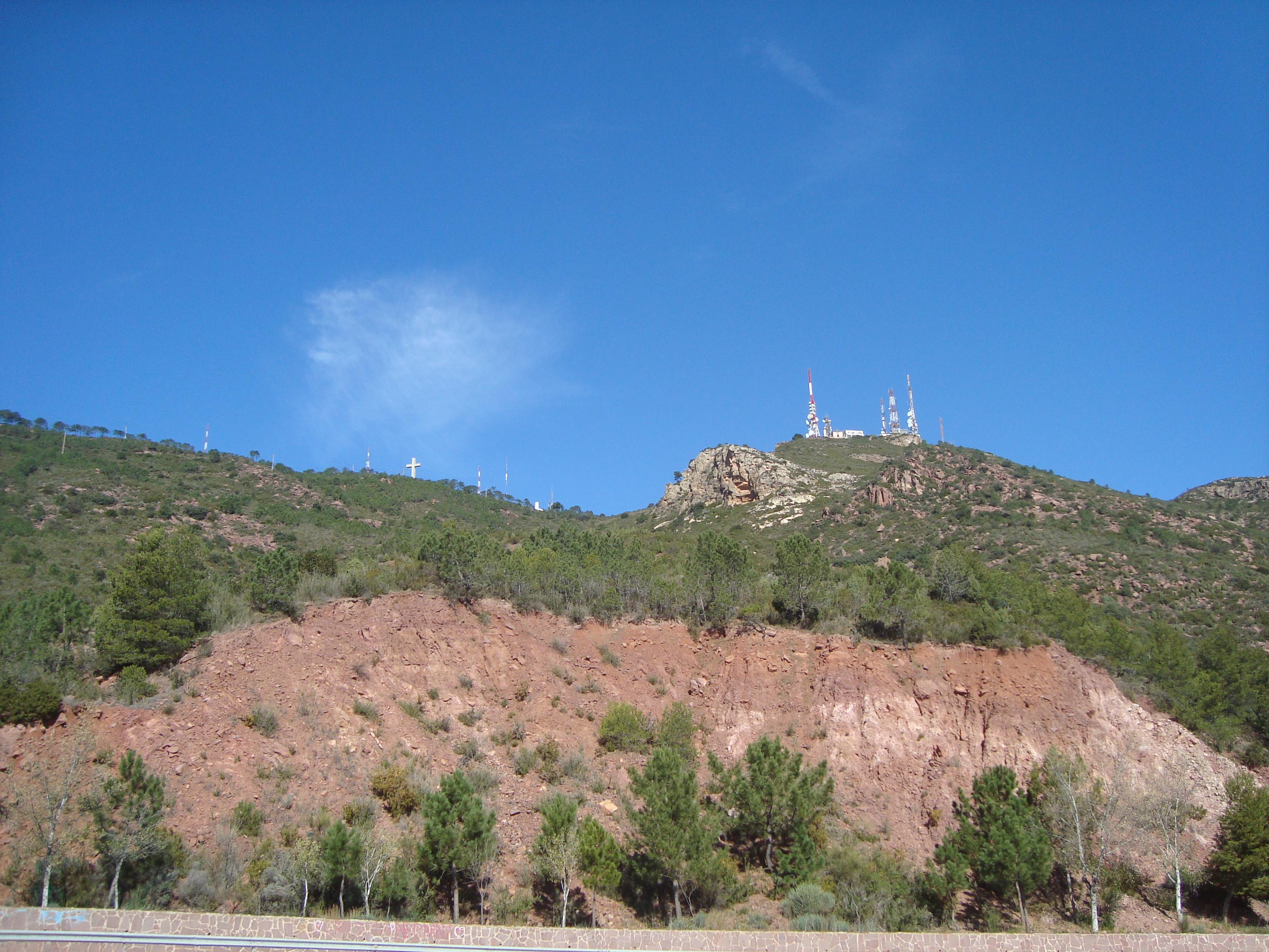 Parque Natural del Desierto de Las Palmas en la provincia de Castellón This is a photography of a Site of Community Importance in Spain with the ID: ES5221002. Natura2000 entry, EEA entry